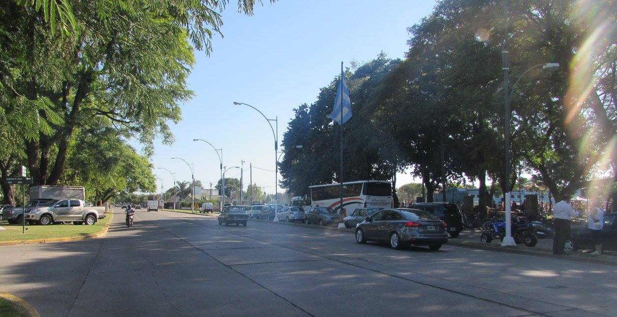 Acceso Norte de la ciudad - A la derecha, la entrada al el Complejo Polideportivo de Argentino de San Carlos